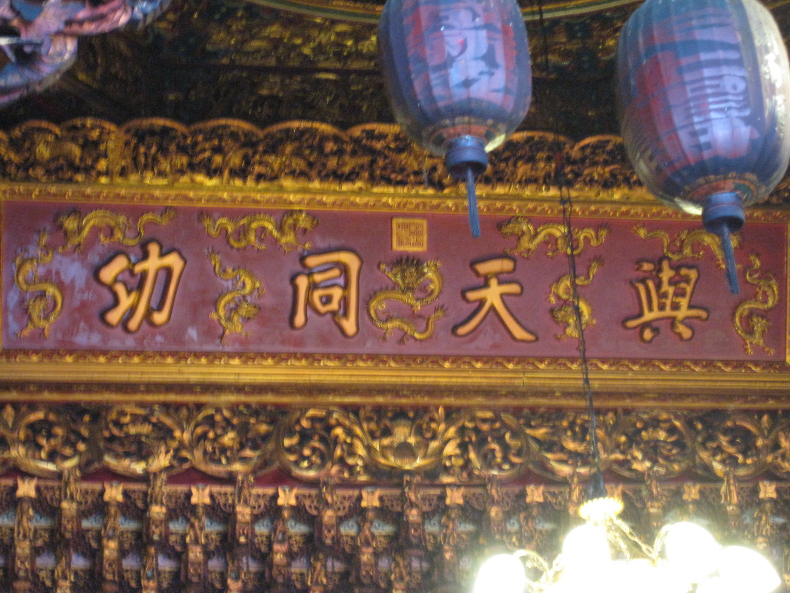 清朝光緒皇帝贈給安平開臺天后宮的「與天同功」御匾